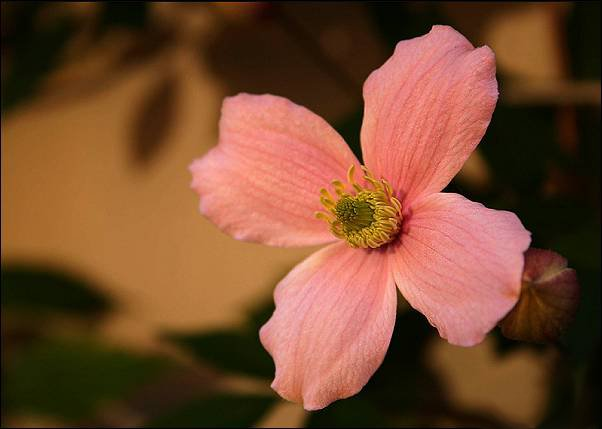 Bjerg-Skovrankes (Clematis montana) vaniljeduftende blosmt